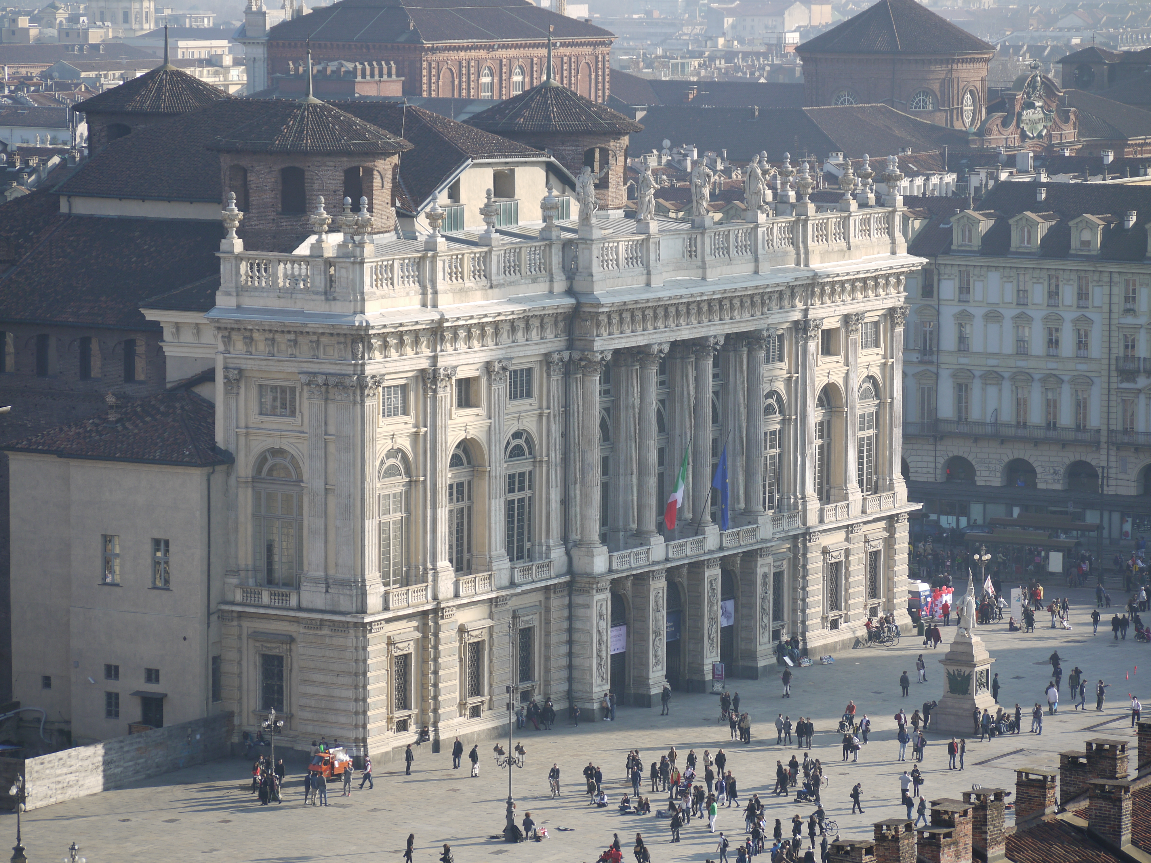 Palazzo Madama, Torino, vista dalla torre campanaria del Duomo This is a photo of a monument which is part of cultural heritage of Italy.